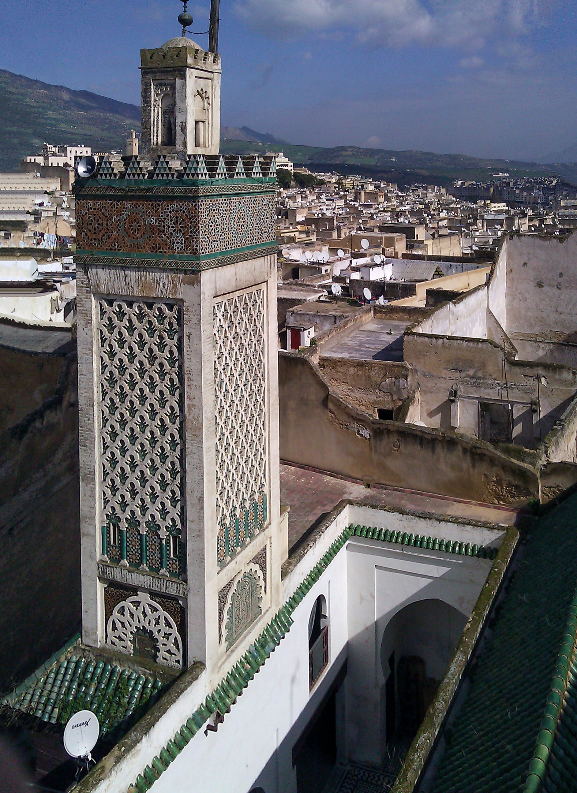 Fes, Morocco